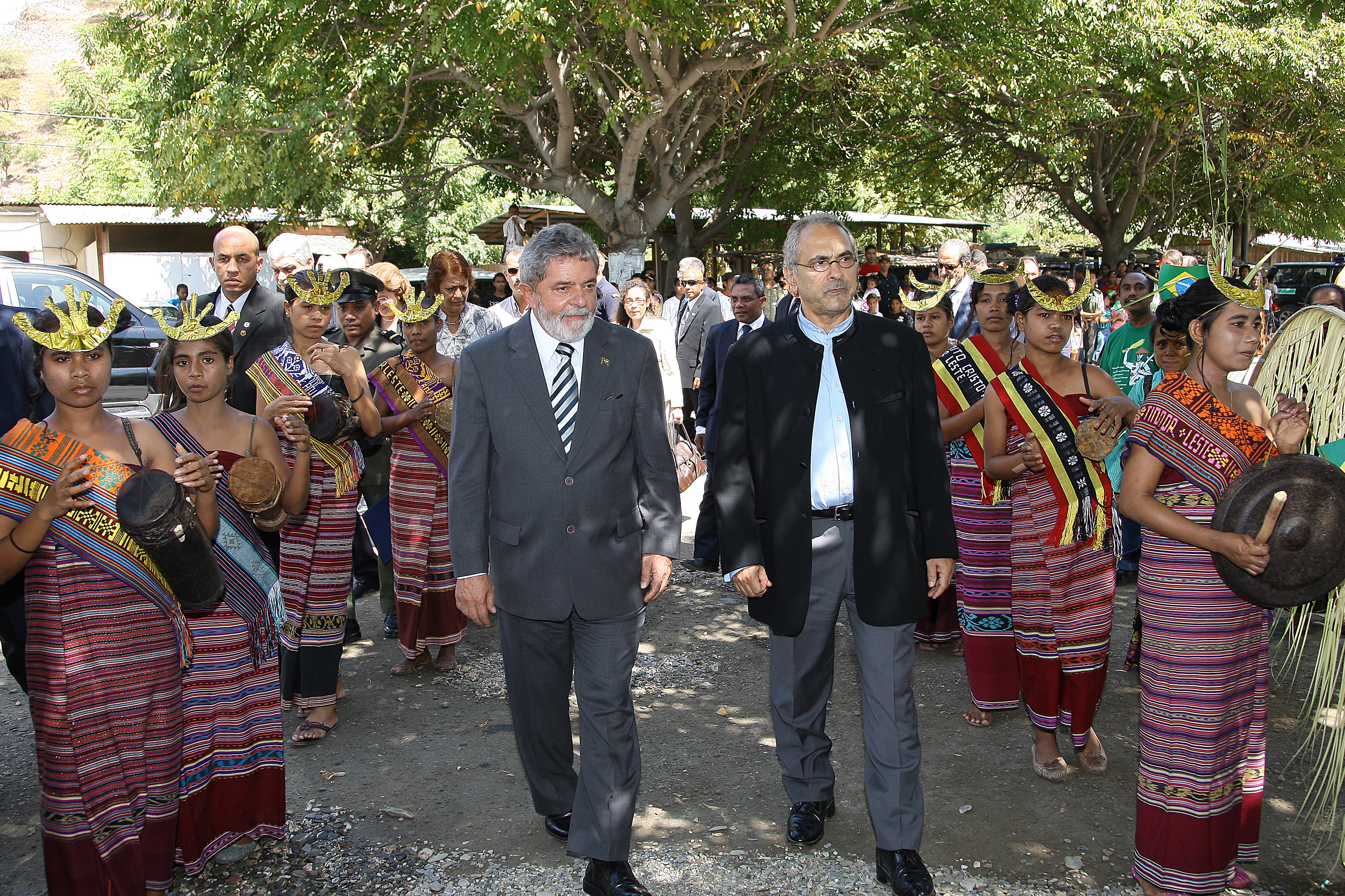 Luís Inácio Lula da Silva e José Ramos Horta.